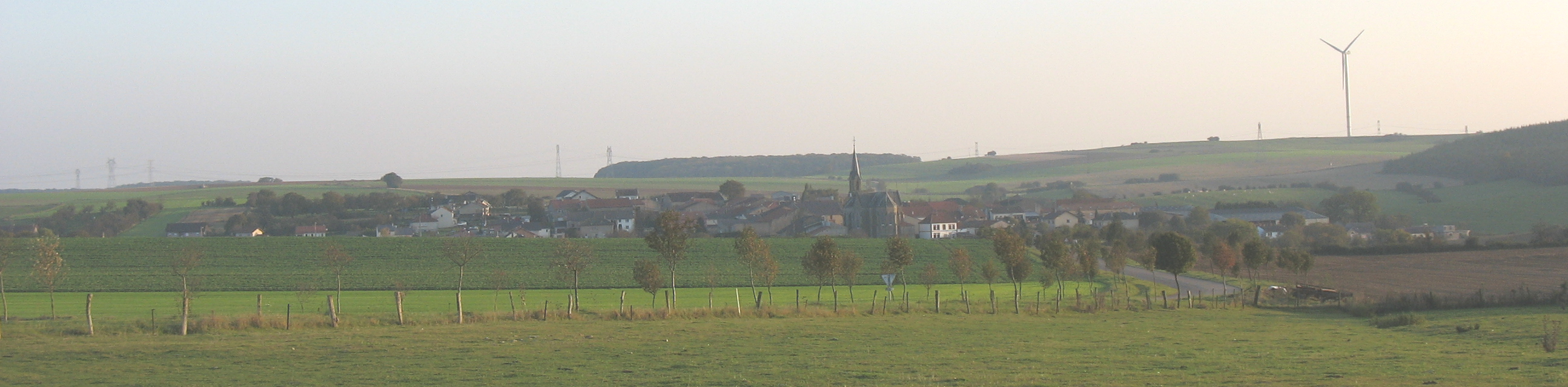 C'est une vue de Momerstroff. On voit une partie du plateau éolien de Momerstroff : il y a encore 4 éolienne plus à droite.